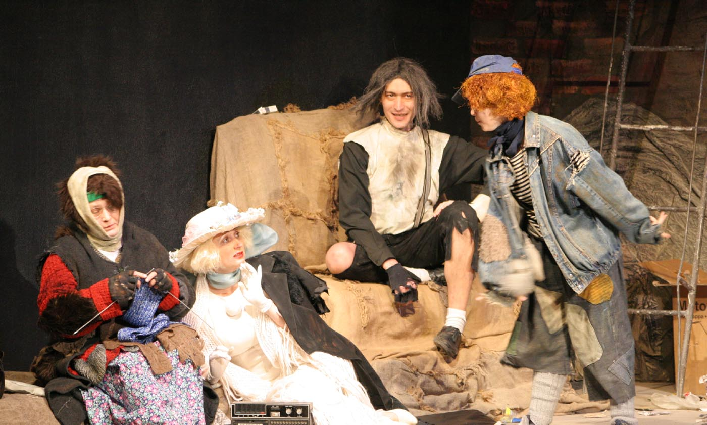 Спектакль Саратовского театра кукол «Теремок» «Брысь»